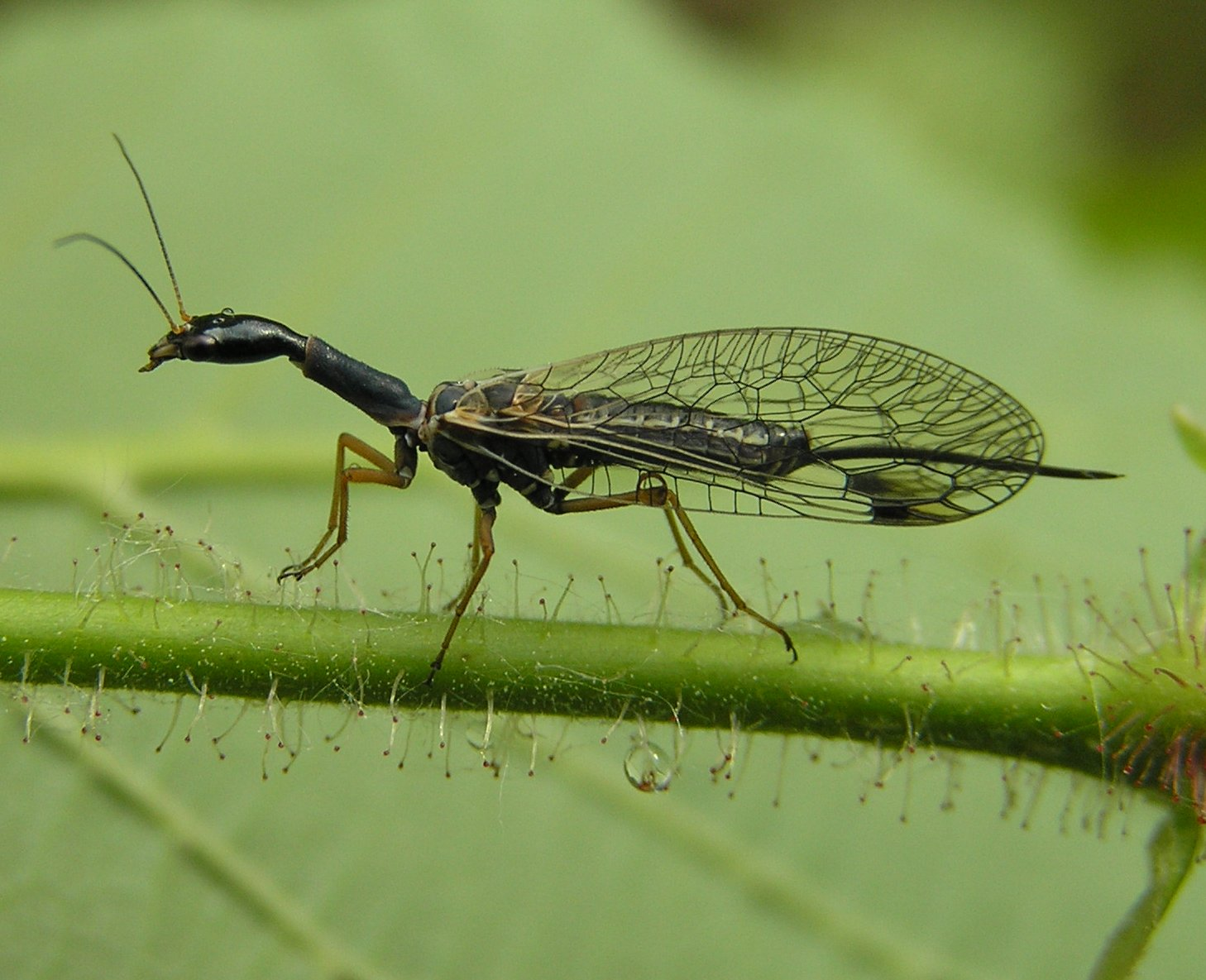 Dichrostigma flavipes on Corylus avellana, Wielbłądka pospolita na liściu leszczyny, Brok, Polska